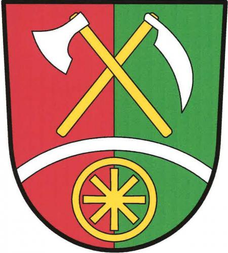 znak, Čečelovice, okres Strakonice